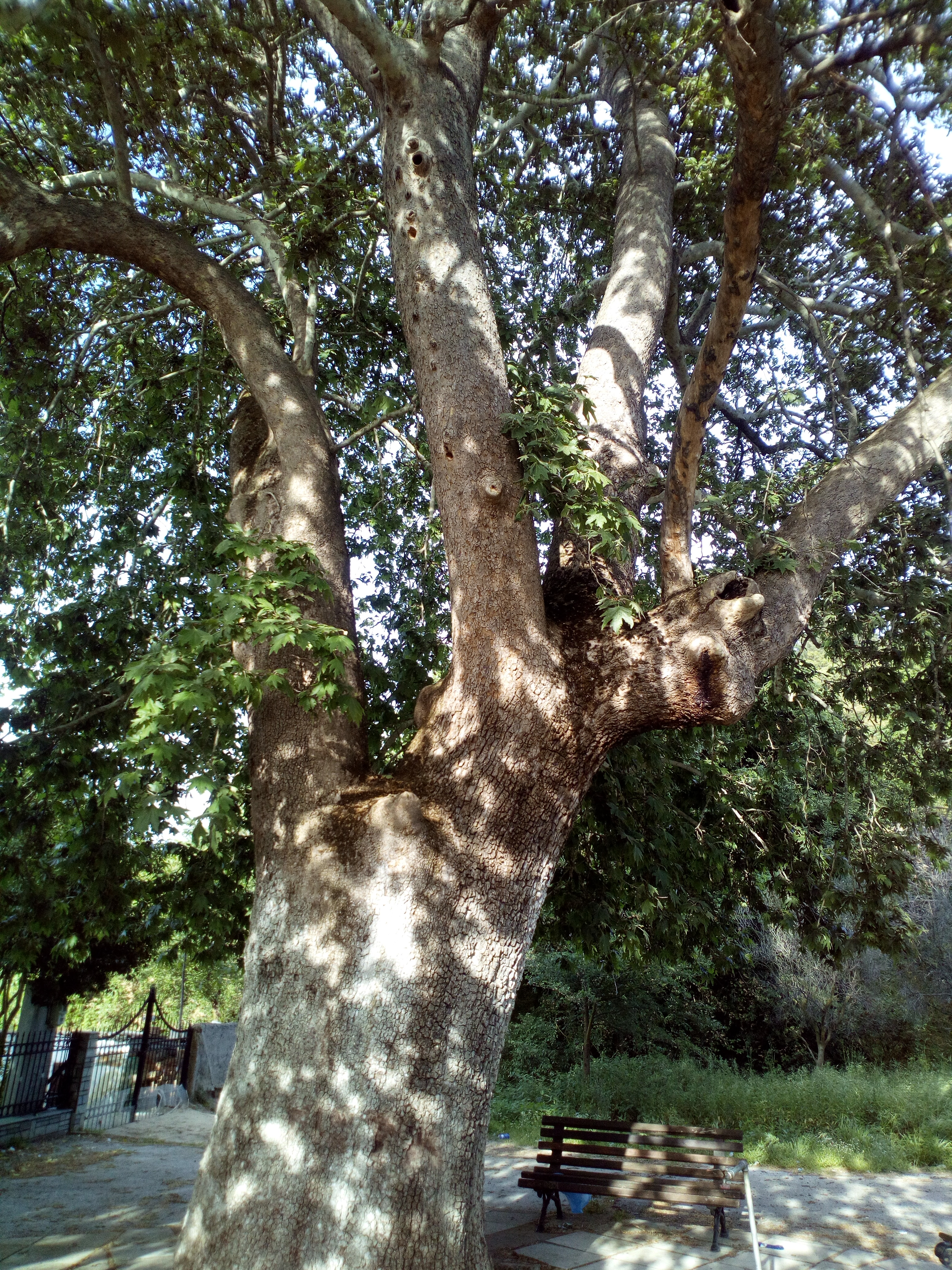 Παλιός πλάτανος και τοποθεσία όπου βρισκόταν παλαιότερα χαρακτηριστική πετρόκτιστη βρύση. DS1 20180429 183053